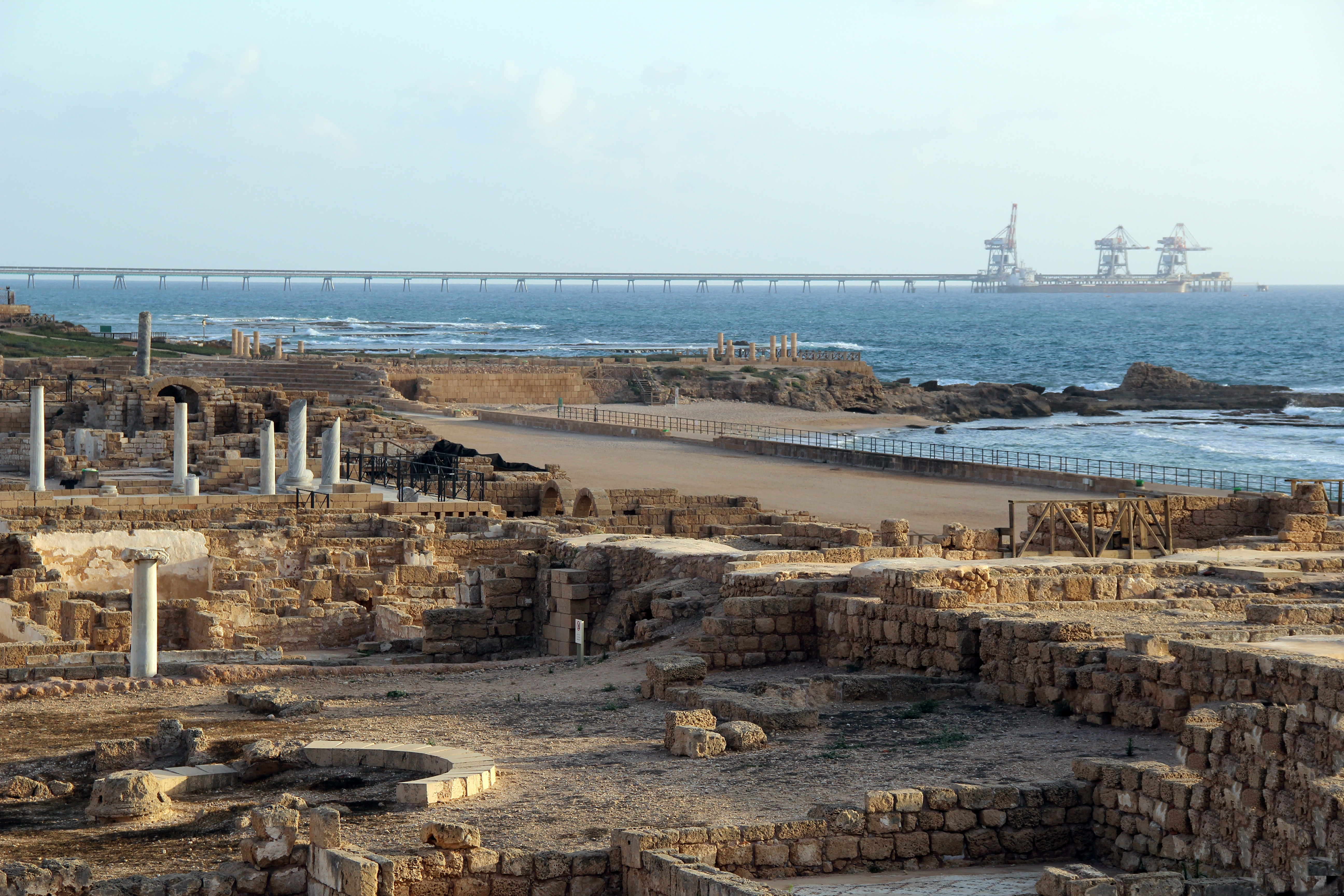 קיסריה היא עיר נמל שהוקמה בשנים 13-25 של לפנה"ס. היא שימשה כבירת ארץ ישראל בתקופה הרומית, ונקראה על שם אוגוסטוס קיסר. כיום העיר העתיקה היא גן לאומי ולידה הוקמה קיסריה המודרנית.